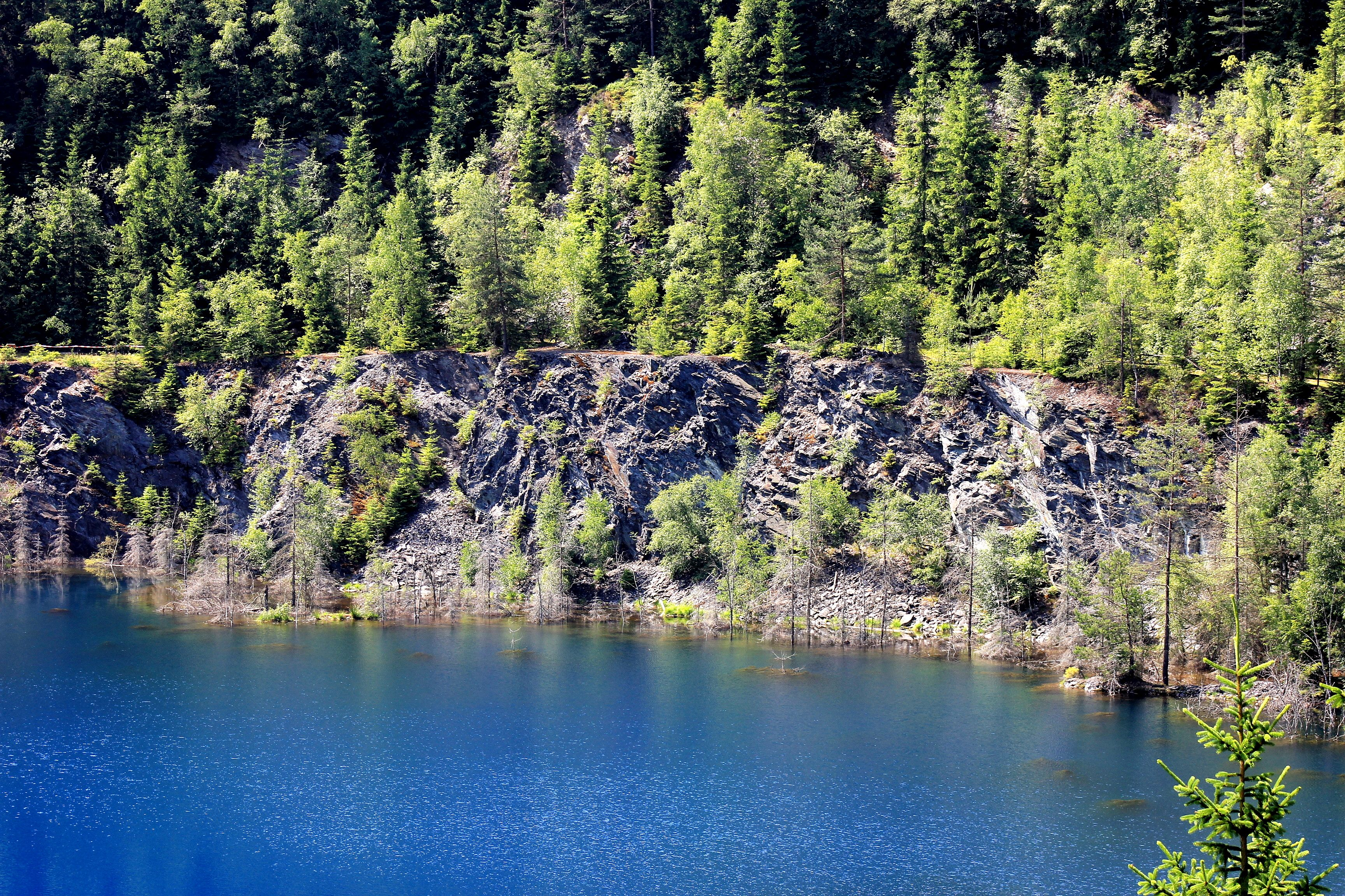 Ausschnitt Schieferbrüche um Lehesten (Fauna-Flora-Habitat 5534-301 Frankenwald - Schieferbrüche um Lehesten)